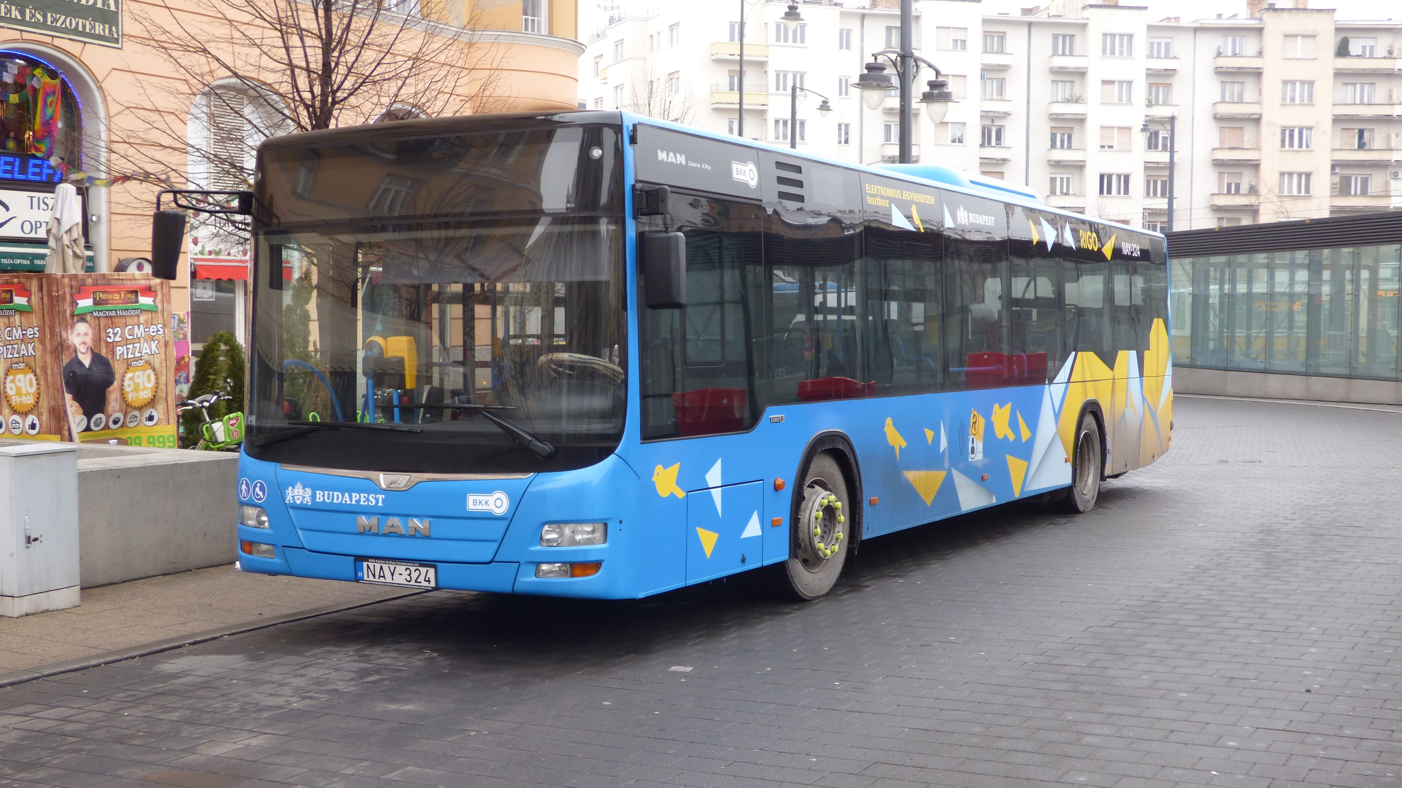 Az elektronikus jegyrendszer teszteléséhez használt MAN A21 Lion's City busz RIGO matricákkal a Móricz Zsigmond körtéren (frsz. NAY-321)